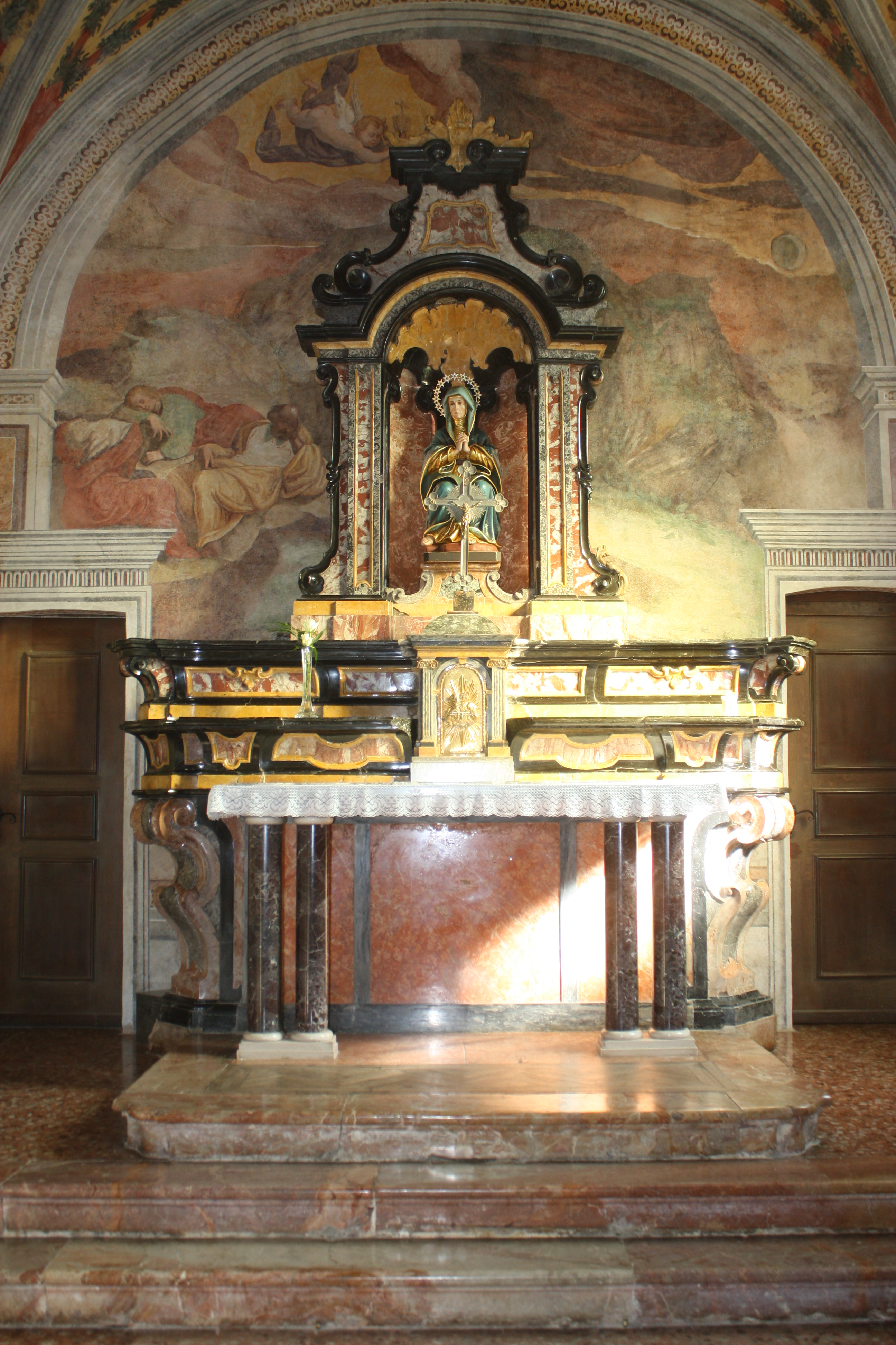 La chiesa di Sant'Apollinare a Crosio della Valle, in provincia di Varese.